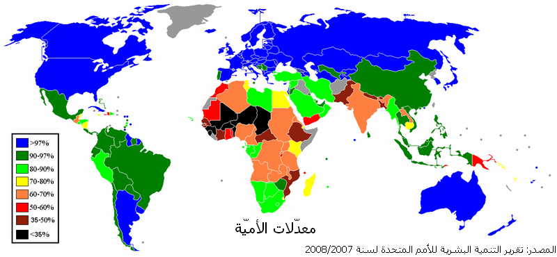 خريطة تبيّن نسبة الأميّة في العالم، تقرير التنمية البشرية للأمم المتحدة لسنة 2007/2008. الرمادي = لا معطيات.